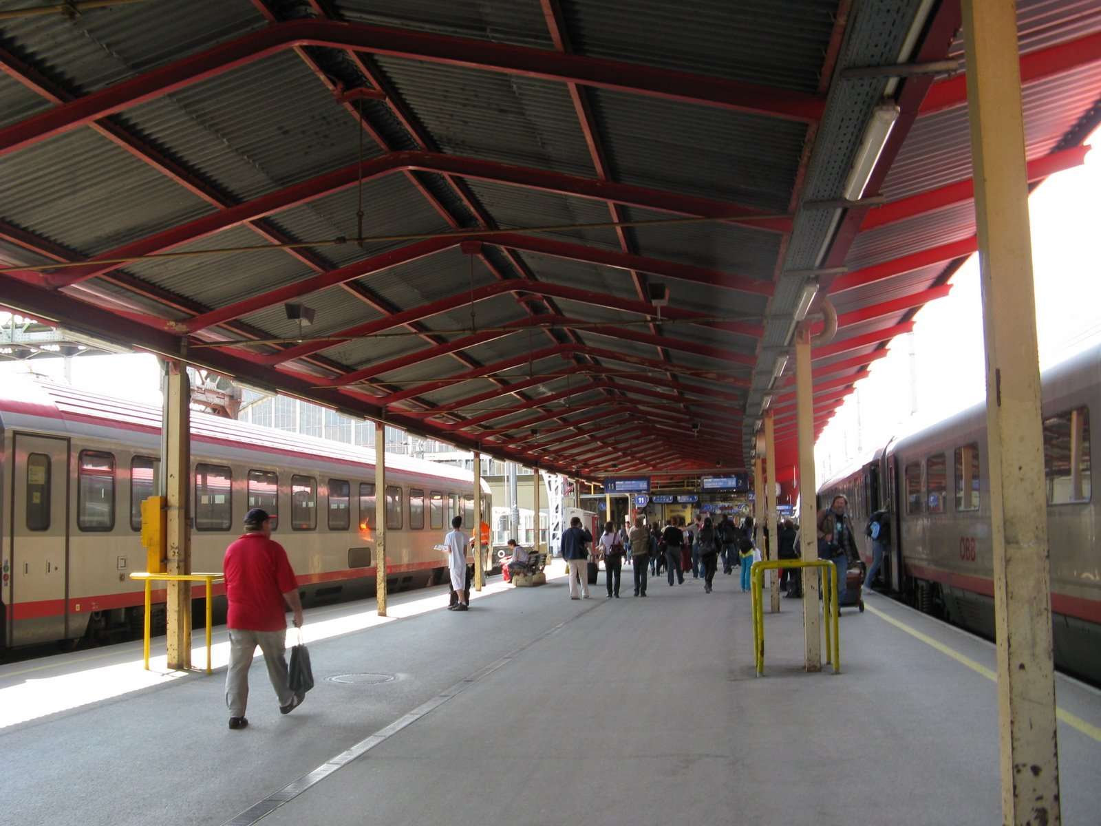 Bahnsteige des Salzburger Hbf